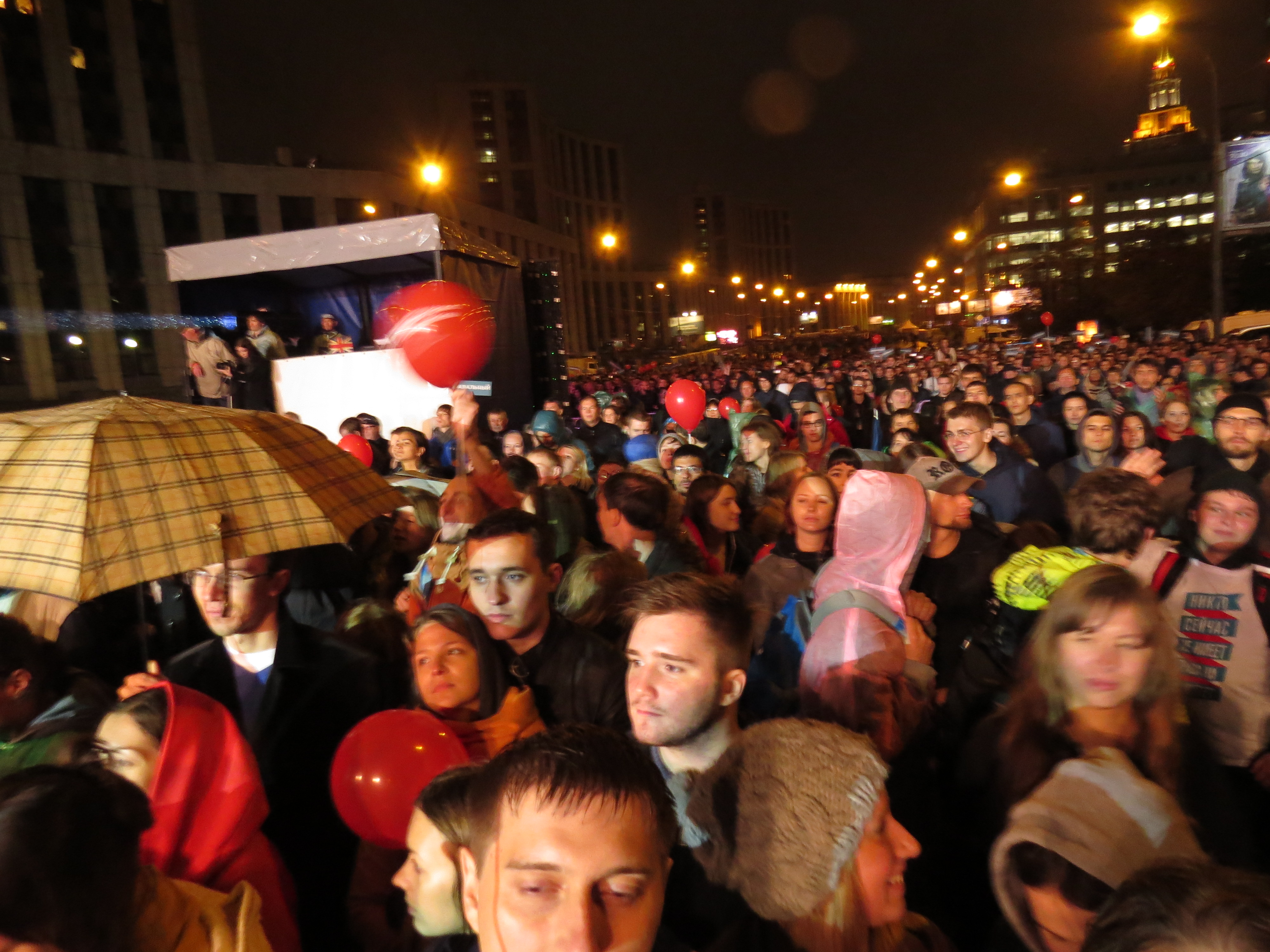 Концерт-митинг в поддержку кандидата в мэры Москвы Алексея Навального на проспекте Сахарова 6 сентября 2013 года